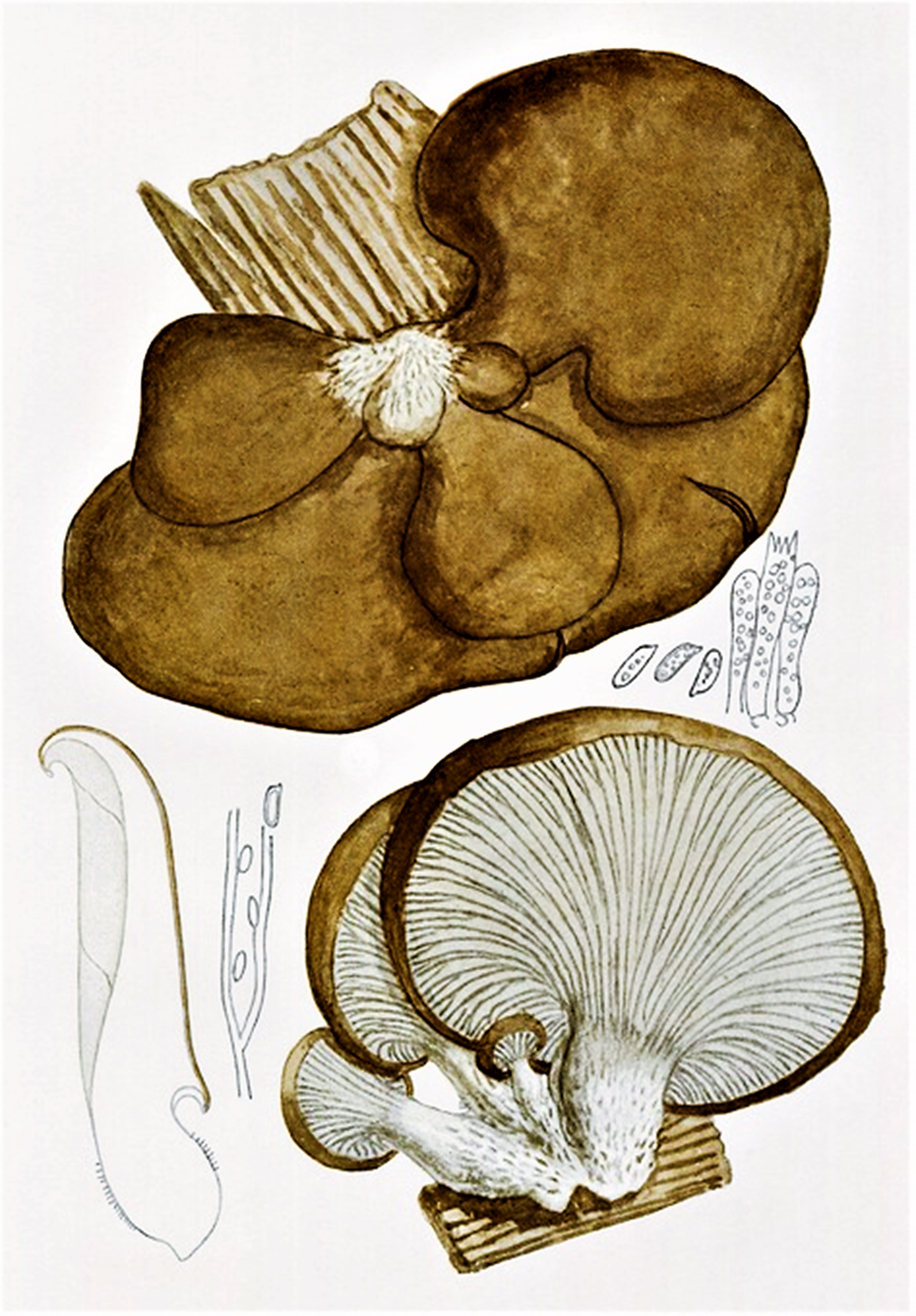 Giacomo Bresadola: Pleurotus ostreatus Jacq., 1774) P.Kumm. (1871)